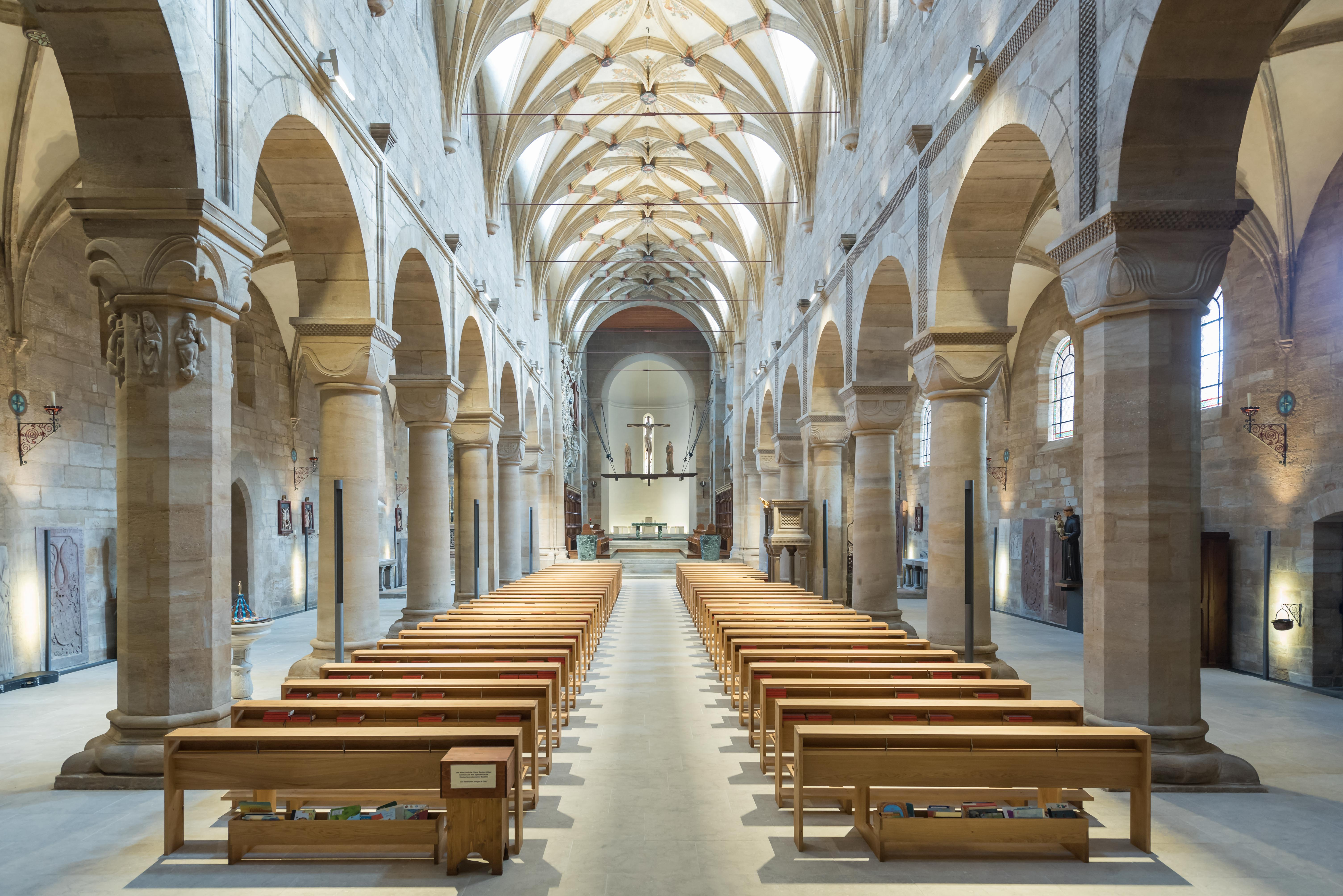 © Regner Michael